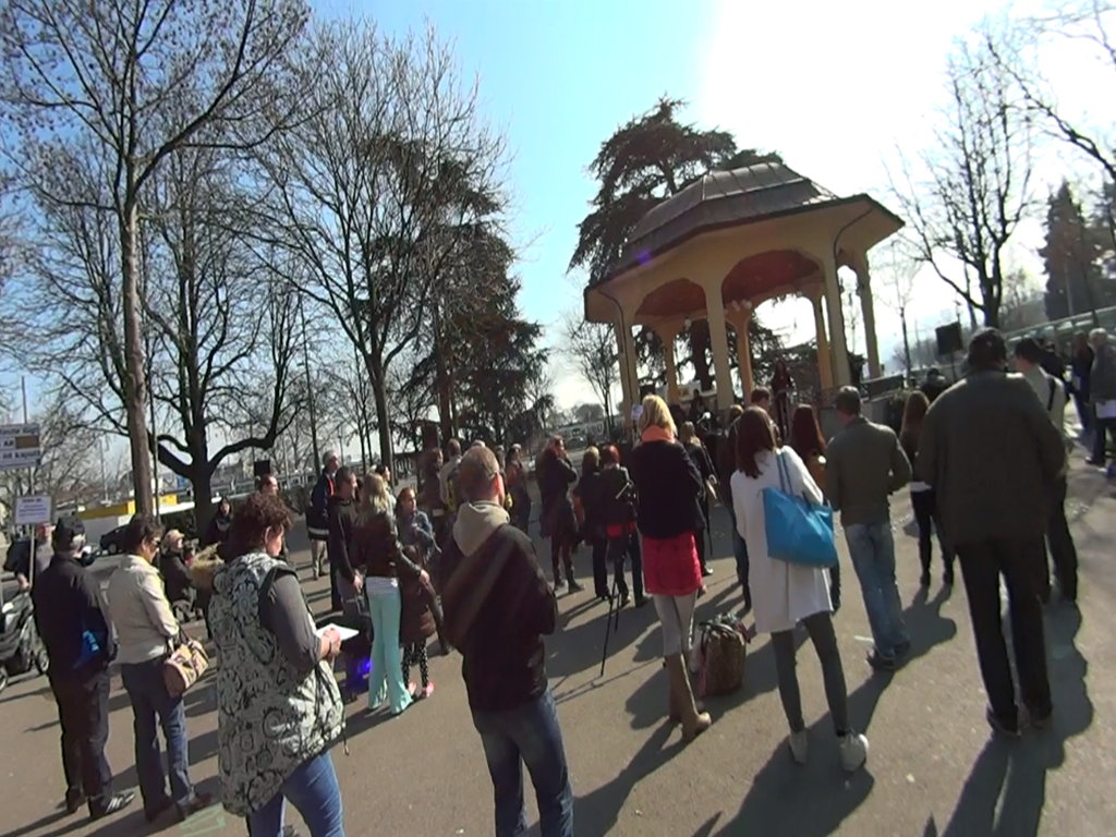 Menschen demonstrieren gegen die KESB am 13. März 2015 in der Stadthausanlage Zürich